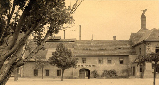 Bývalý pivovar ve Štětí. Měšťanský pivovar spolu se starou radnicí z roku 1608 stál na místě dnešního kulturního střediska na Mírovém náměstí.